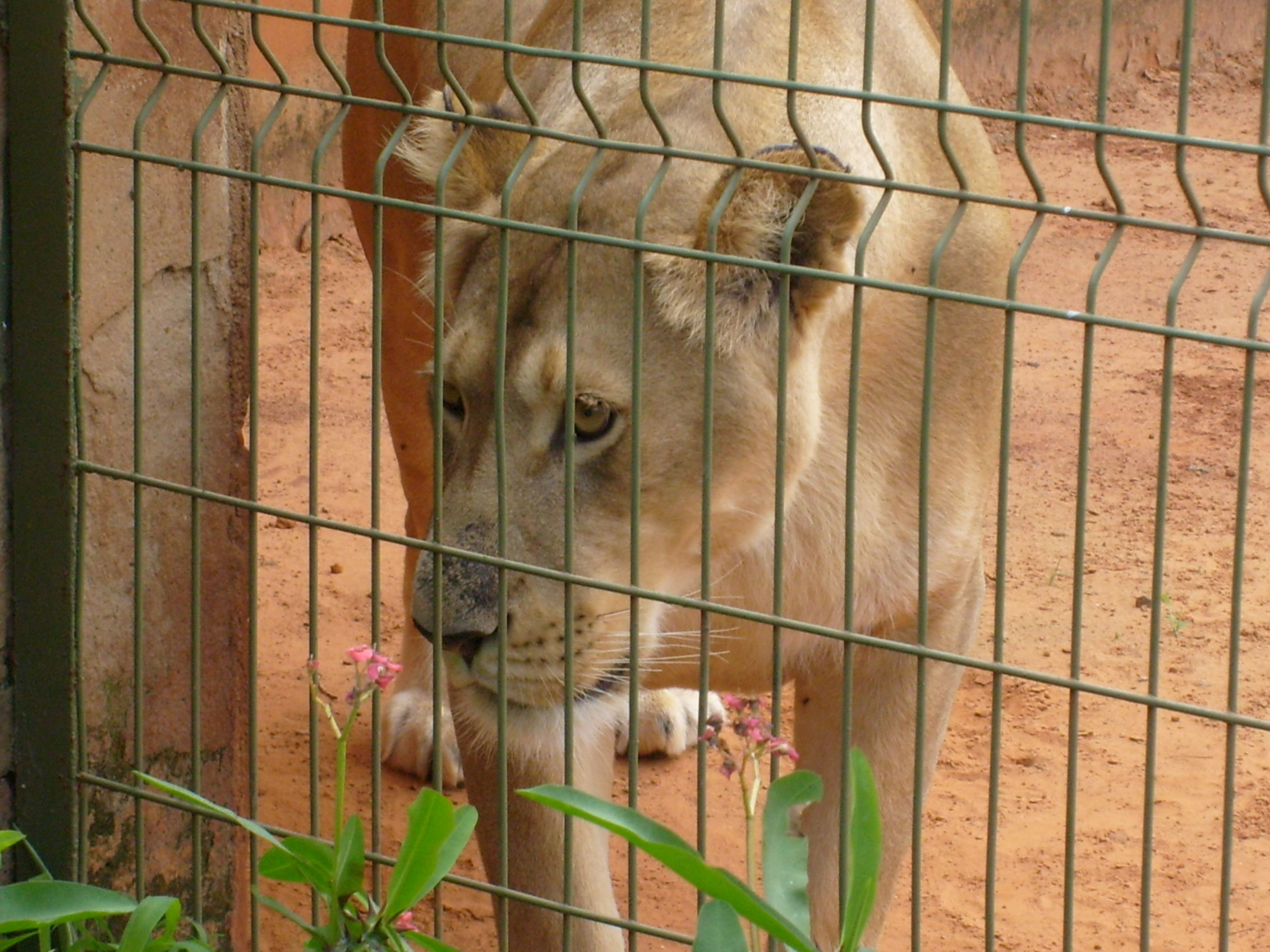 Leoa num zoológico. Americana-SP, Brasil.